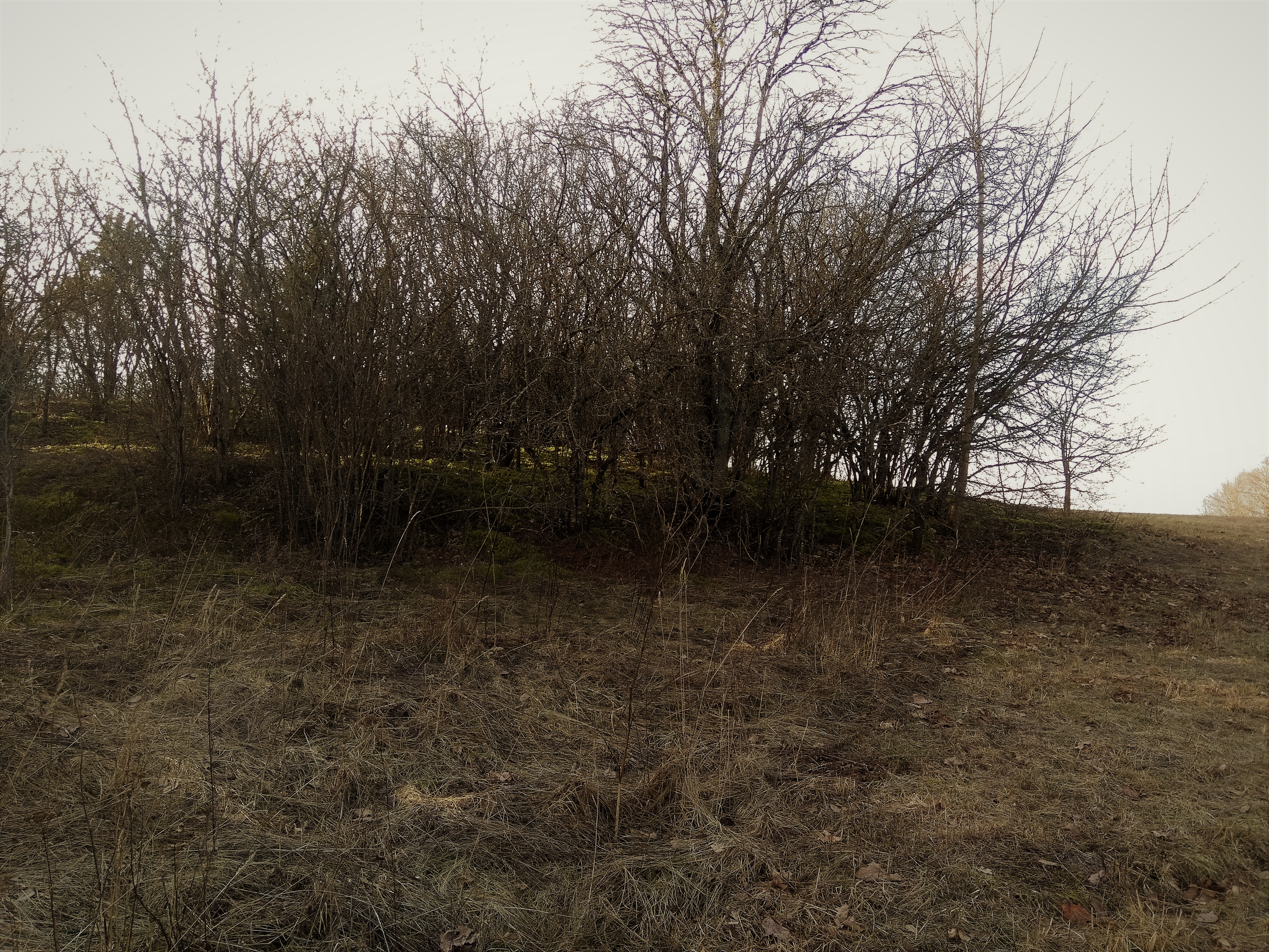 Vaade idast linnuse maa-ala ida-kirdenurgale.